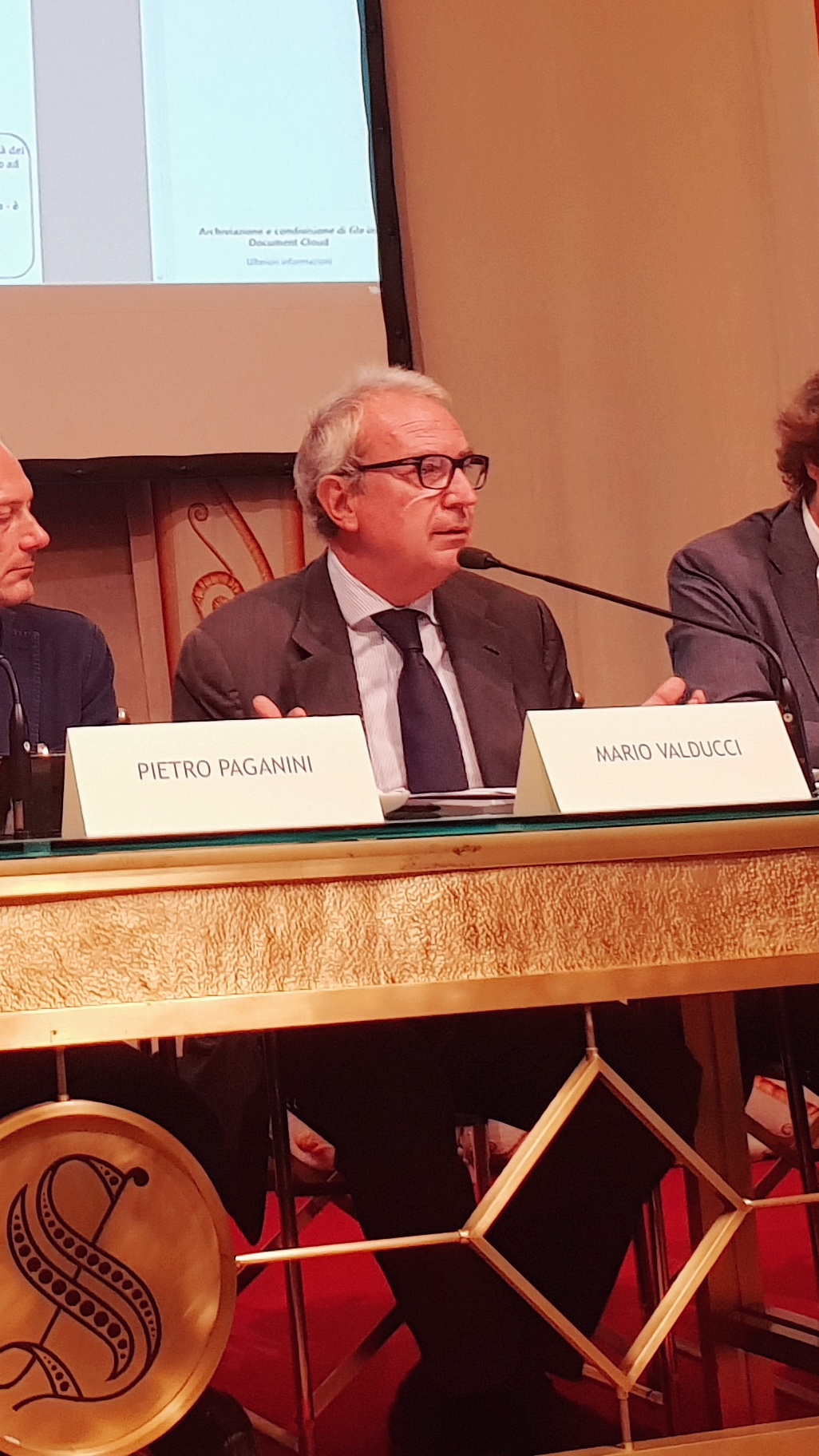 Mario Valducci relatore in Senato